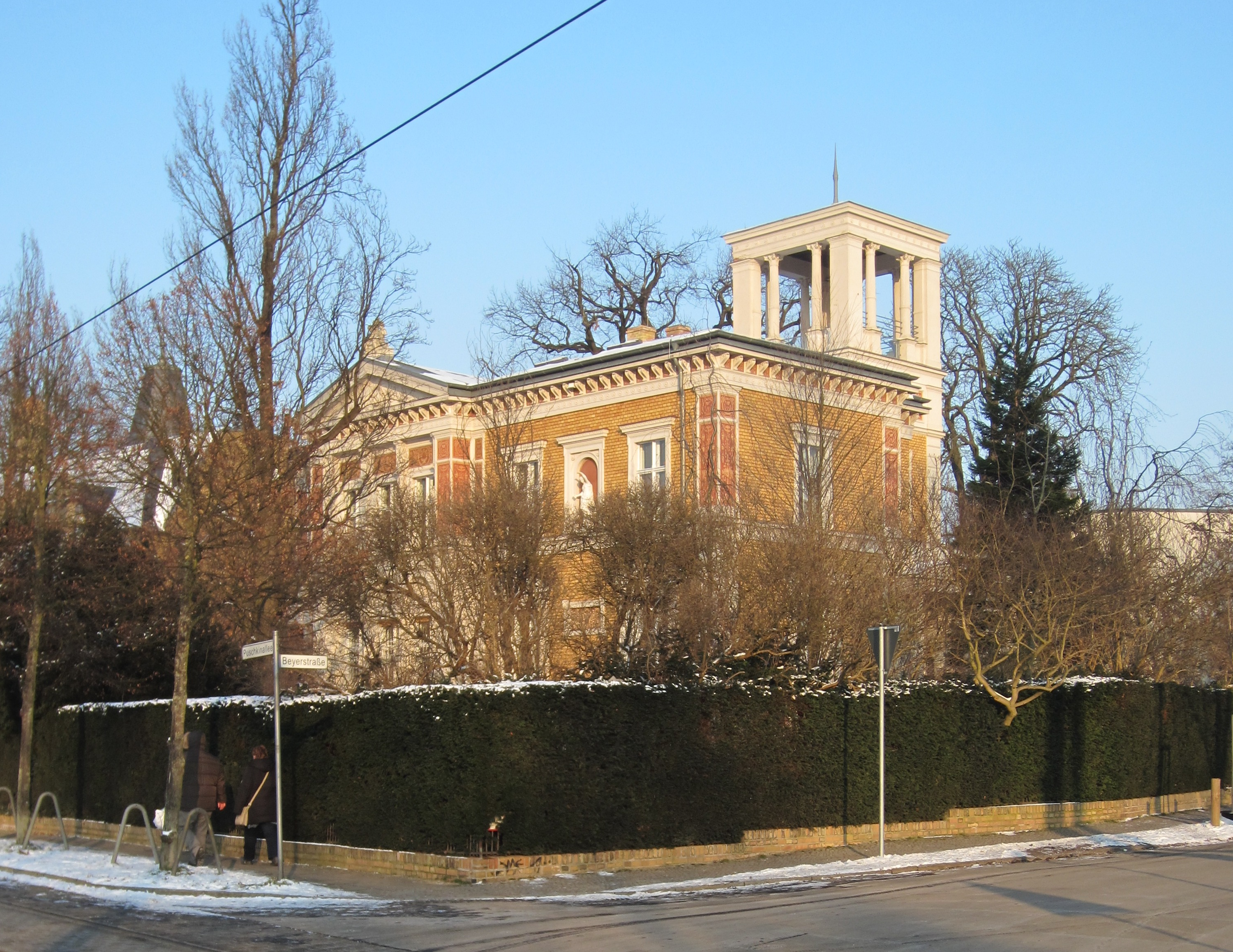 Denkmalgeschützte Villa Lüdicke, Puschkinallee 10 in Potsdam, erbaut 1876/77 nach Plänen von Albert Lüdicke, Ansicht von Südwesten